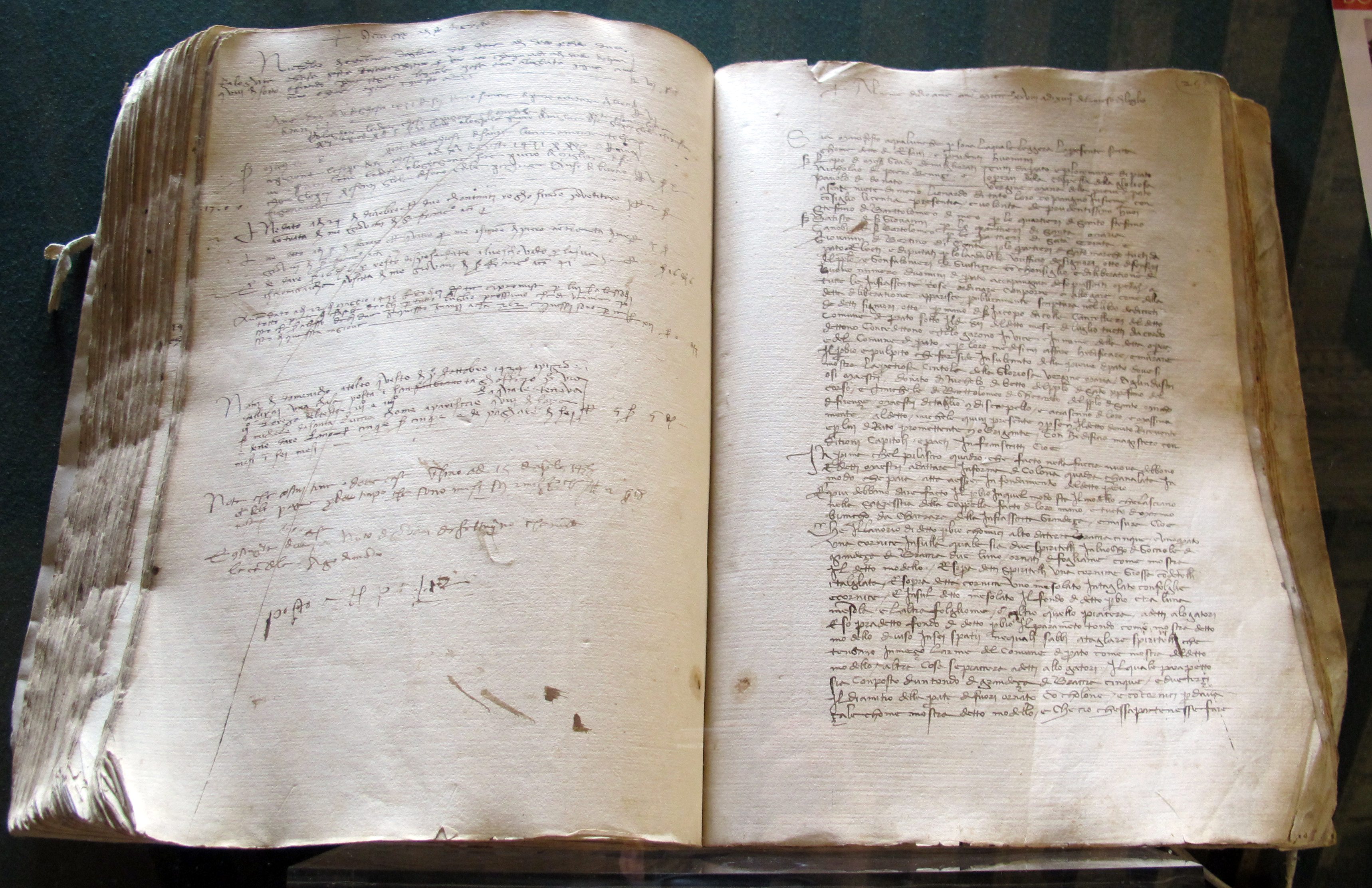 Palazzo Datini, Prato